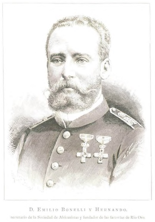 Emilio Bonelli y Hernando. Secretario de la Sociedad de Africanistas y fundador de las factorías de Río Oro